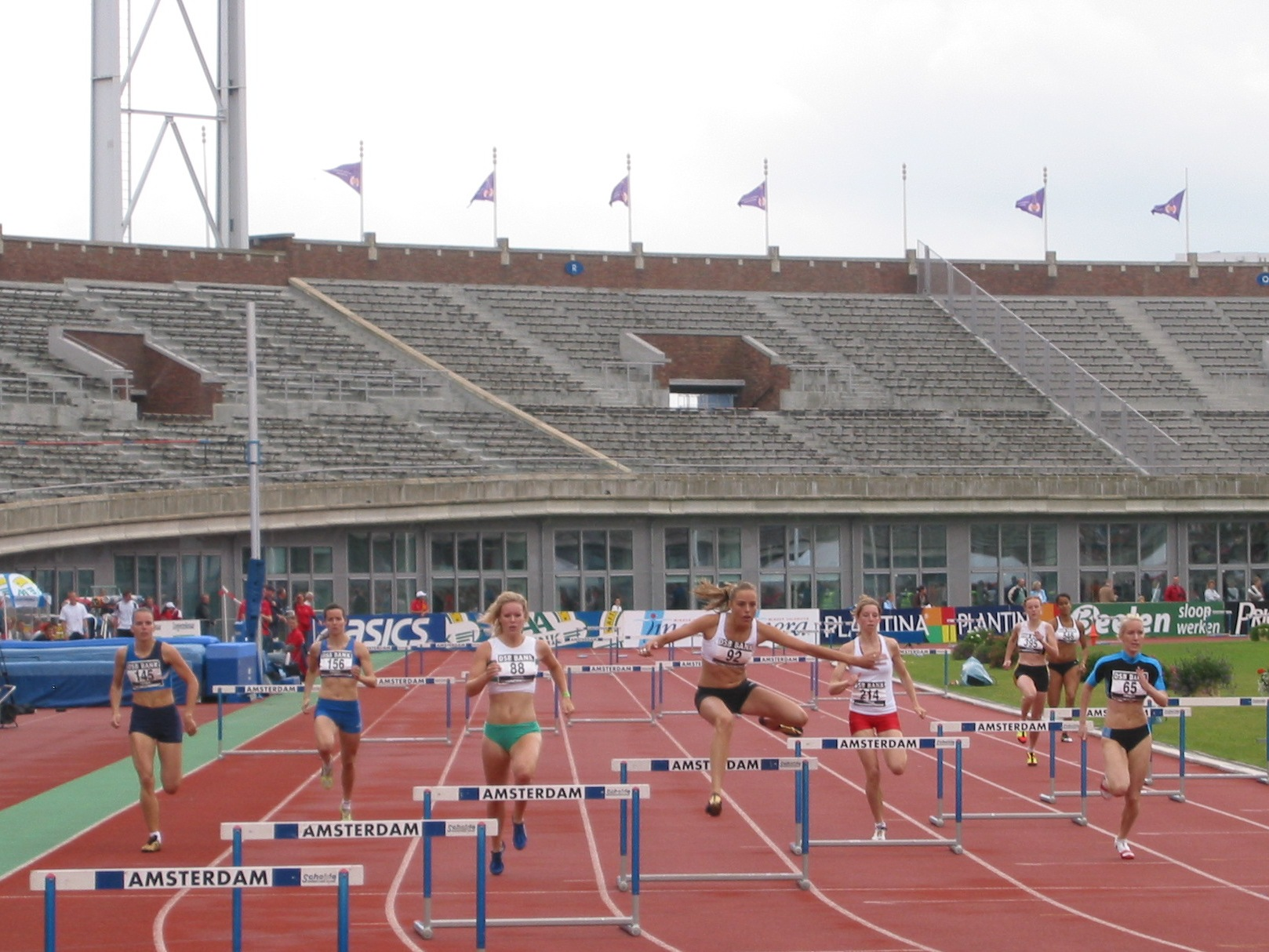 Dutch championship 2007, Amsterdam, 400 meter horden women